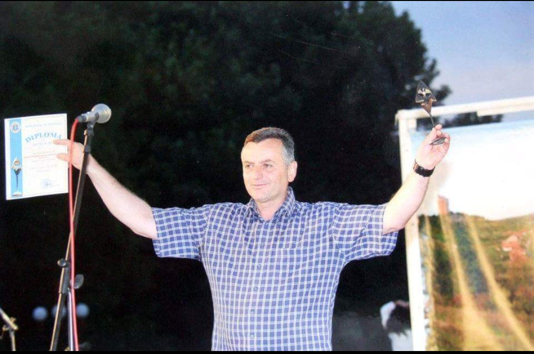 Primanje nagrade